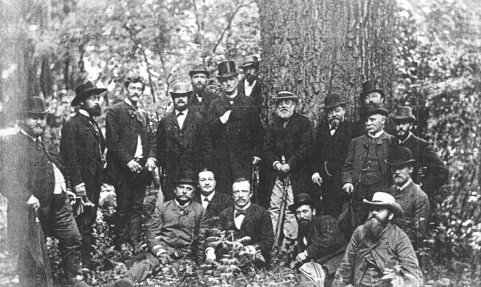 Exkursion der Berliner Gesellschaft für Anthropologie, Ethnologie und Urgeschichte nach Weisdin bei Neustrelitz am 28. Juni 1885 abgebildete Personen: 1. Rudolf Virchow, 2. Hans Virchow, 3. Theodor Schlemm, 4. Richard Rohde, 5. Otto Cordel, 6. Albert Voß, 7. Otto Olshausen, 8. Eduard Seler, 9. Eduard Jacobsthal, 10. Eduard Krause, 11. Paul Telge, 12. Carl Künne, 13. Moritz Vater, 14. Herman Sauer.